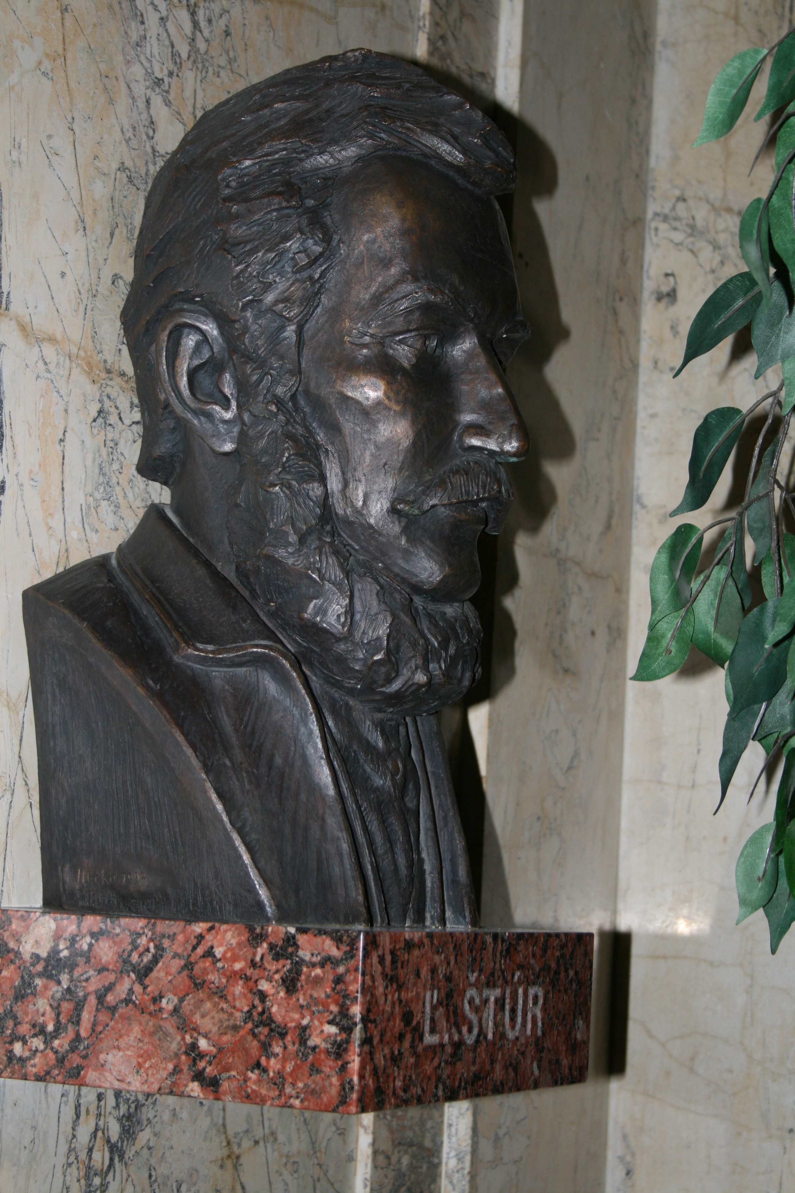 SiSwati: Autorom busta Ľudovíta Štúra vo vstupných priestoroch ministerstva kultúry je Ilečko (1997)